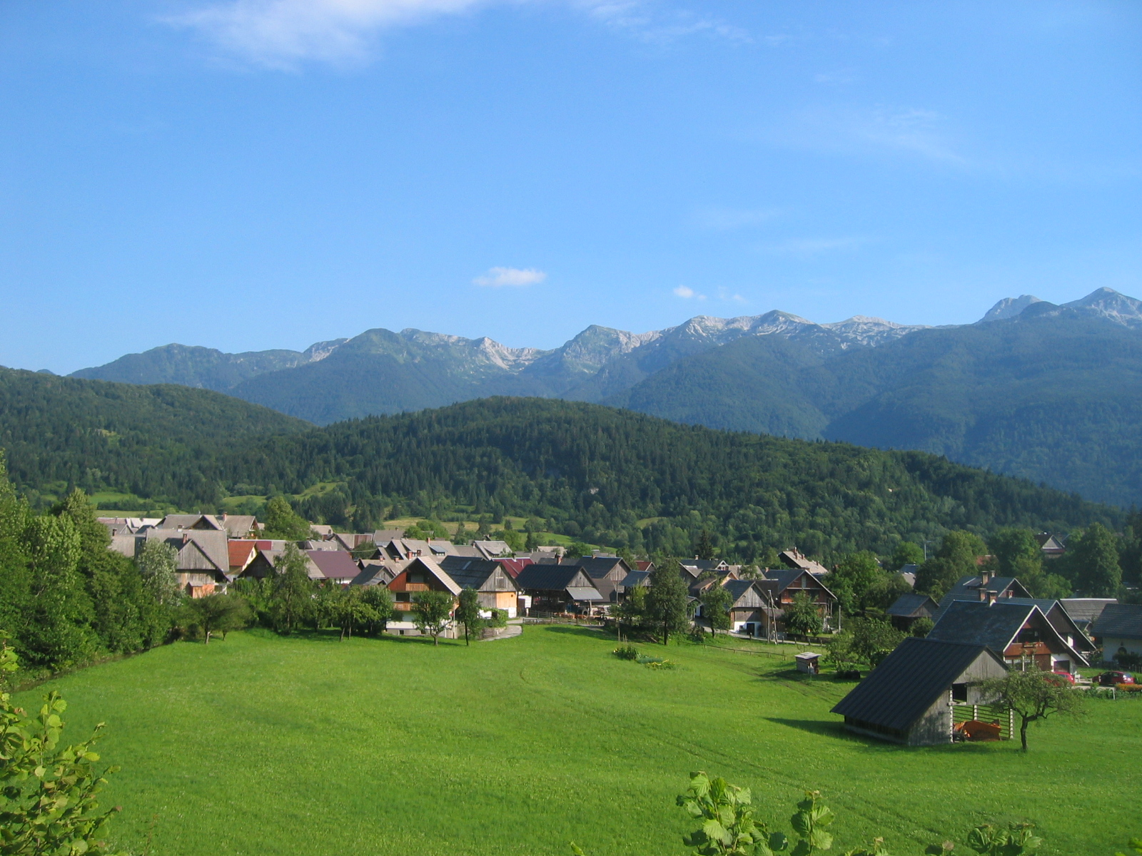 Stara fužina, village near Bohinj lake in Slovenia